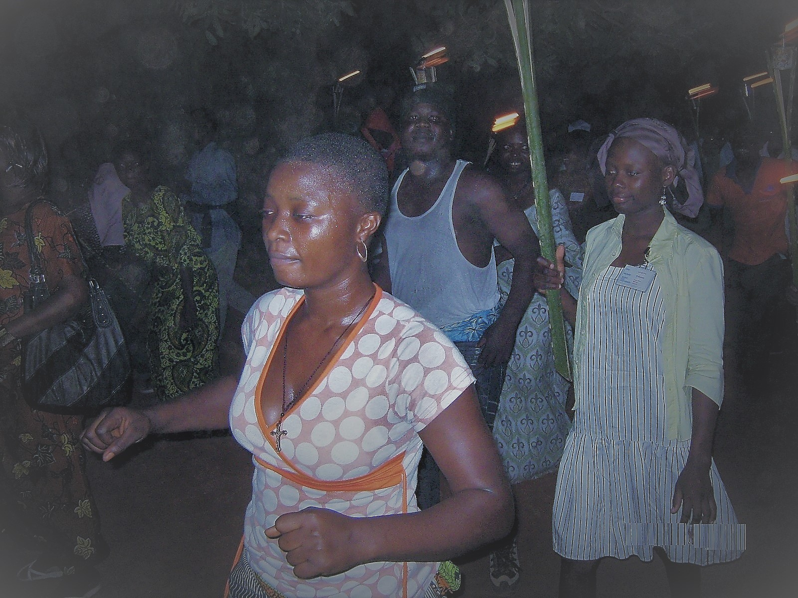 Une femme dansant lors d'une Marche aux flambeaux à la veille de la tenue d’un forum des jeunes à Dangbo au Bénin. vue prise en 2009